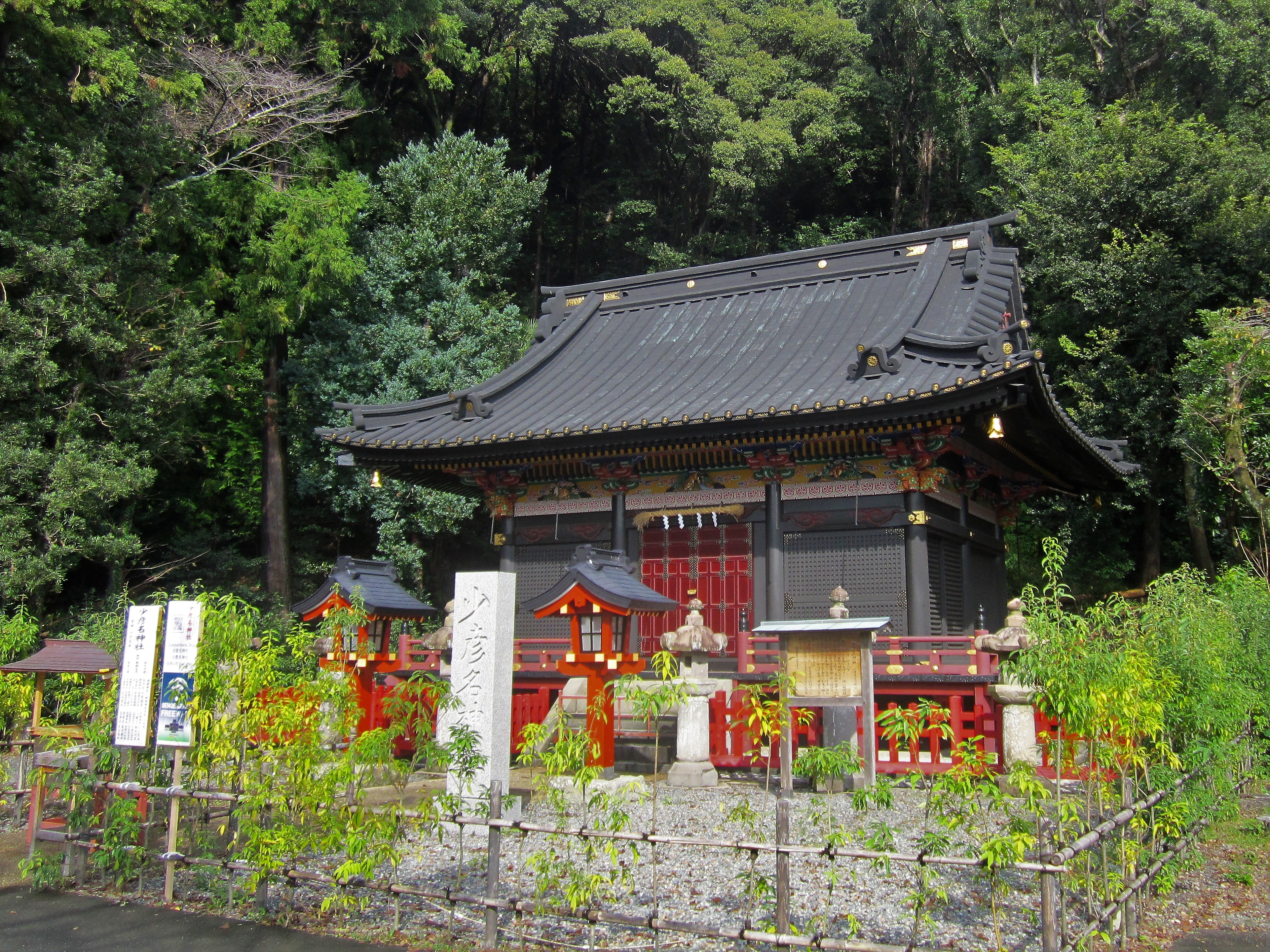 静岡浅間神社 少彦名神社